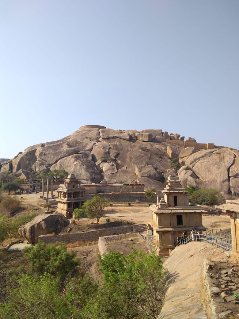 சித்ரதுர்கா கோட்டை - நுழைவு வாயில்